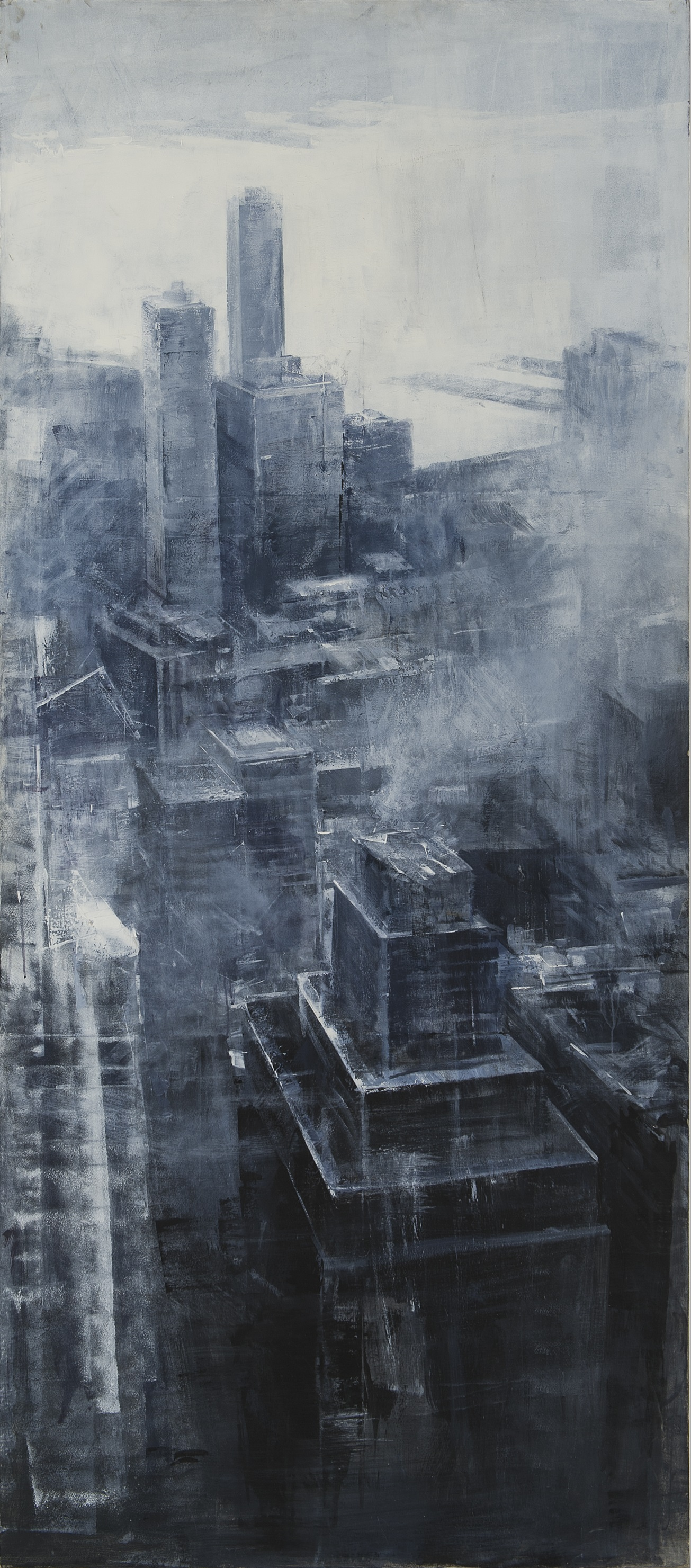 Алексей Алпатов. New York, 2012, холст, акрил, 250x110 см